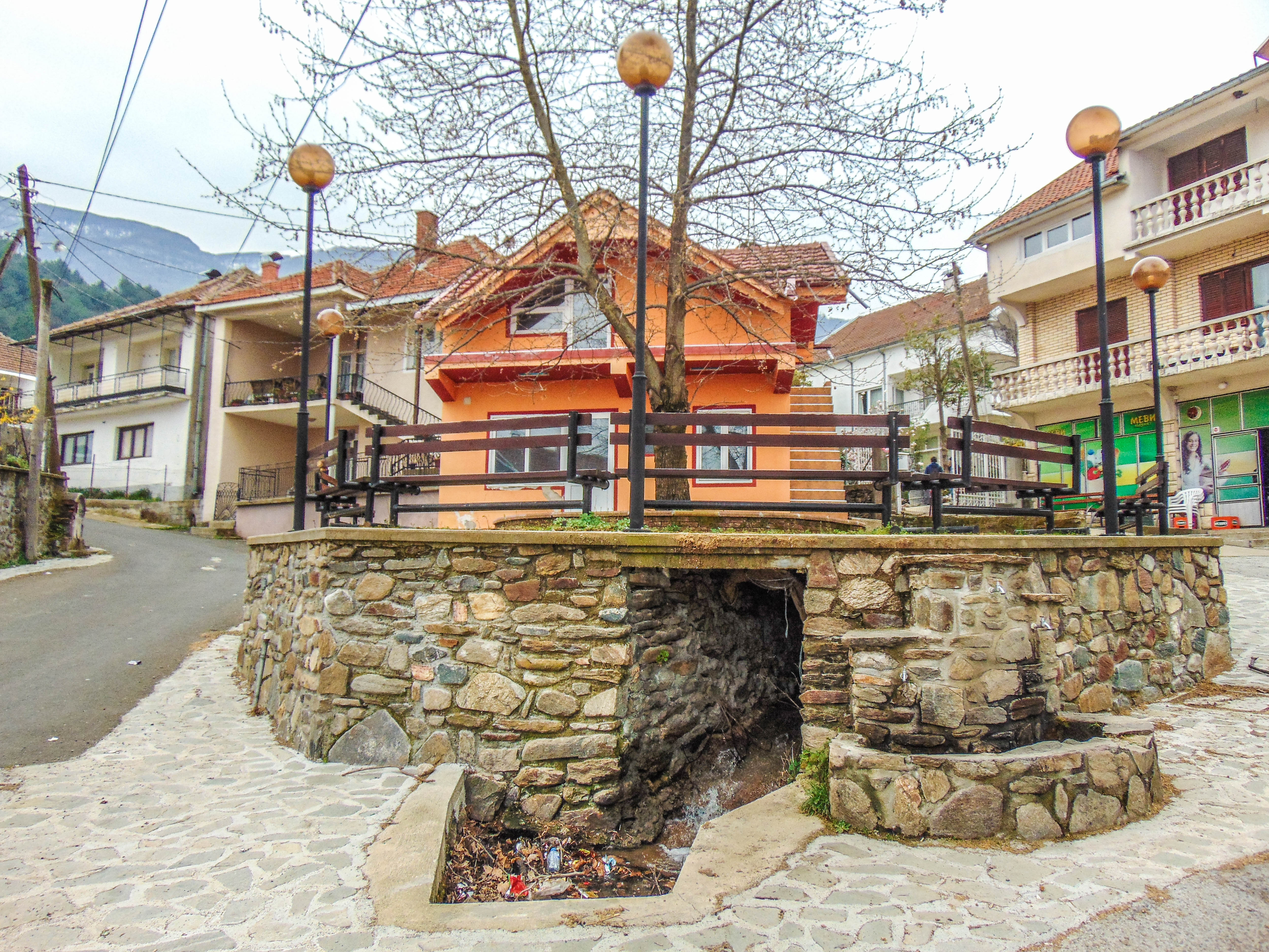 Смолари